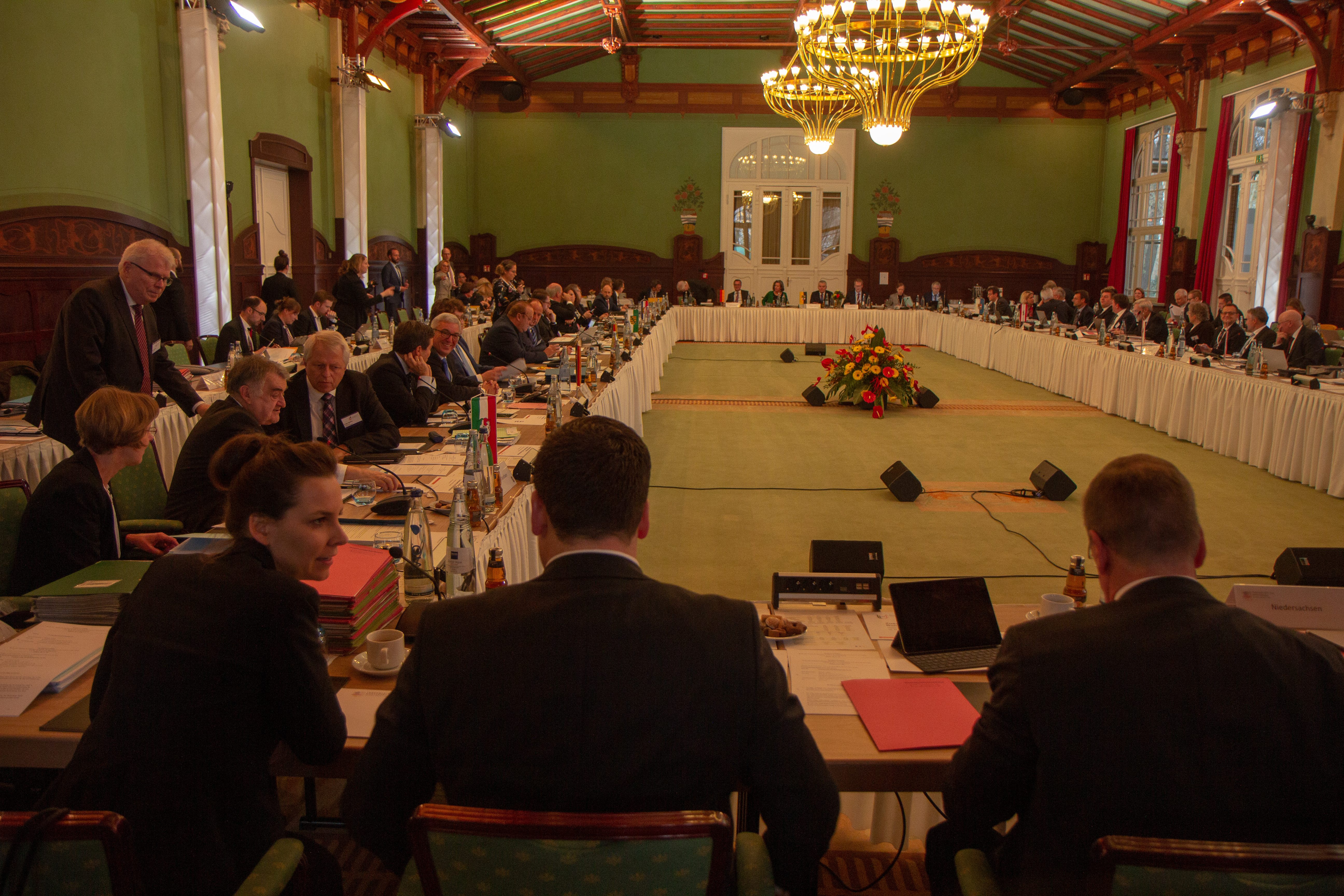 209. Innenministerkonferenz vom 28.-30. November in Magdeburg